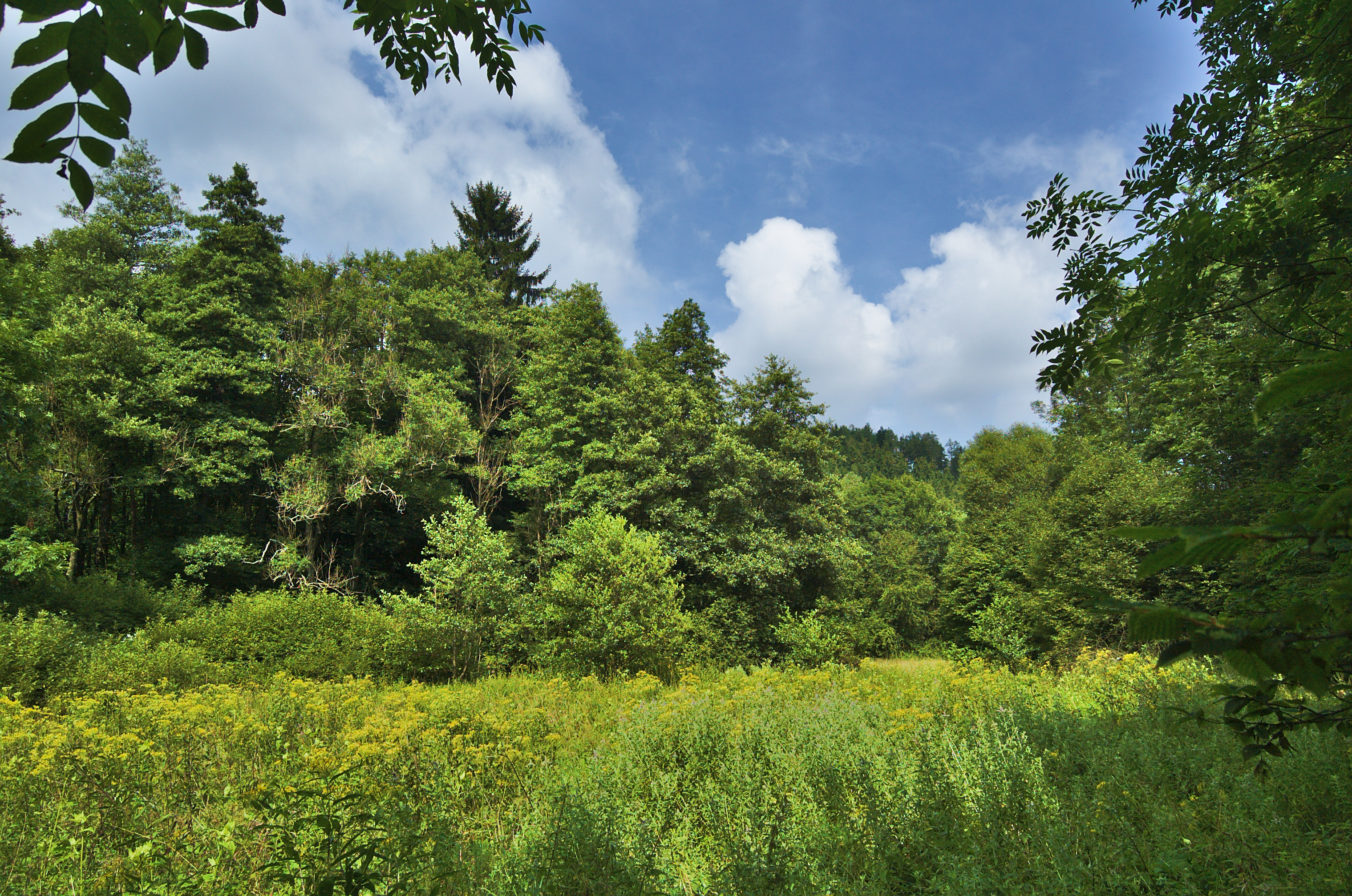 Rozhraní přírodní rezervace Pod Švancarkou a přírodní památky Horní Bělá, rozhraní okresů Prostějov a Blansko